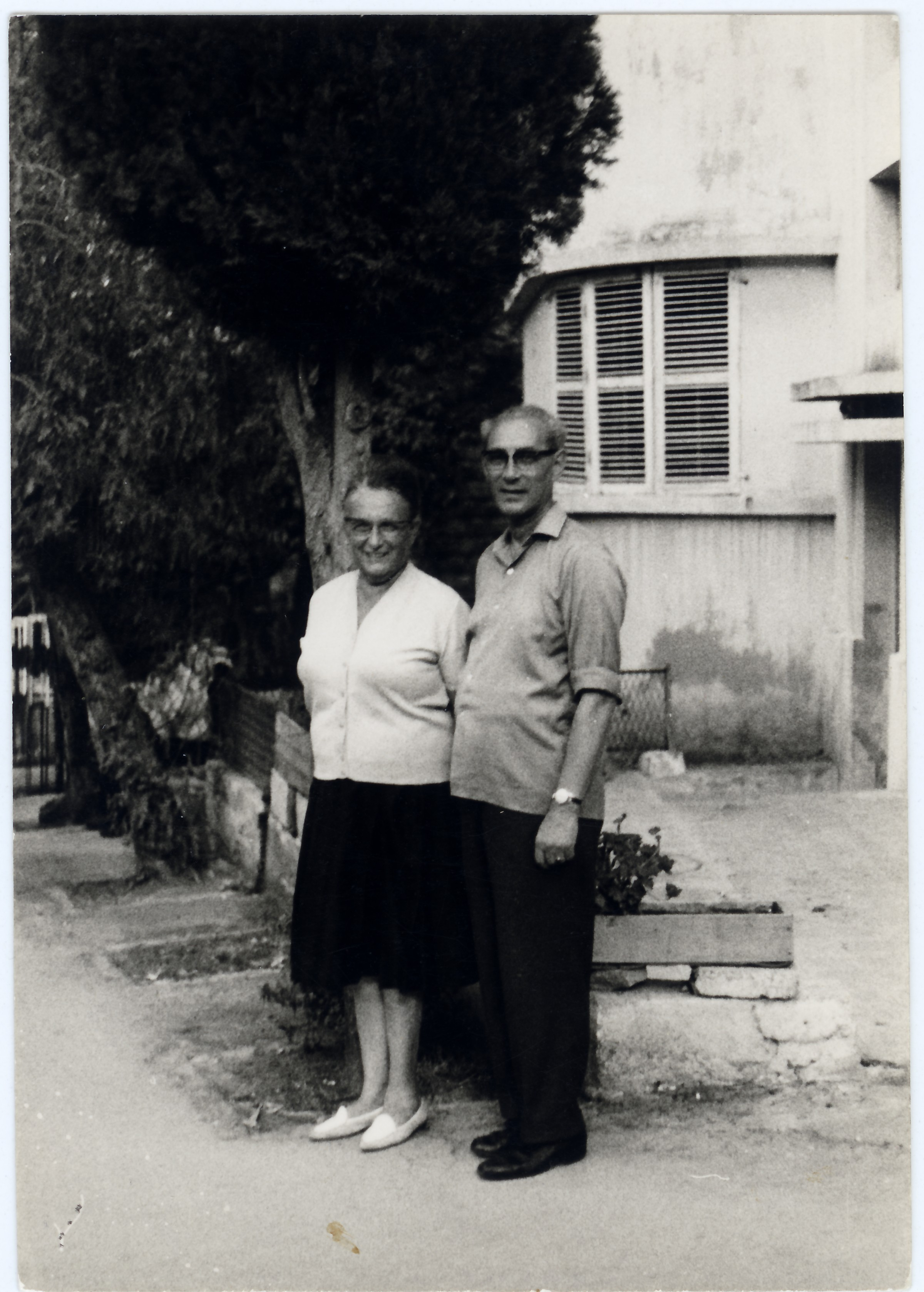 האספנים, משה וטובה בר-דוד